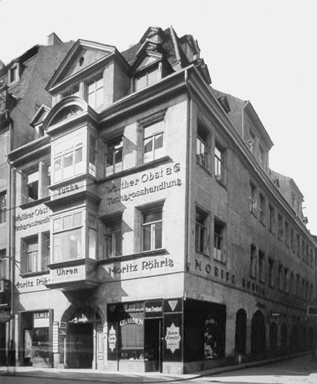 Der Alte Hof in Leipzig, Katharinenstraße 27 / Ecke Böttchergasse